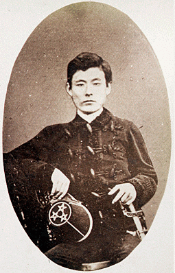 岡本柳之助（東京鎭台予備砲隊大隊長）、紀州藩出身。